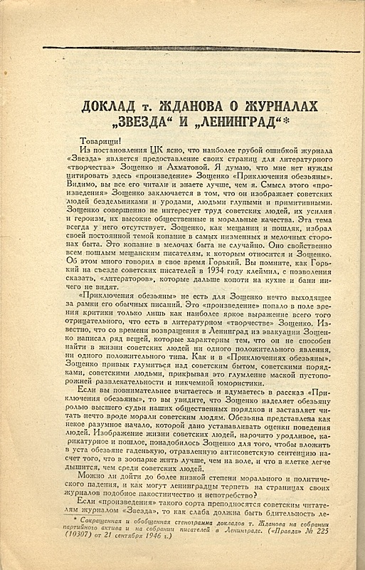 Доклад А. А. Жданова "О журналах "Звезда" и "Ленинград""